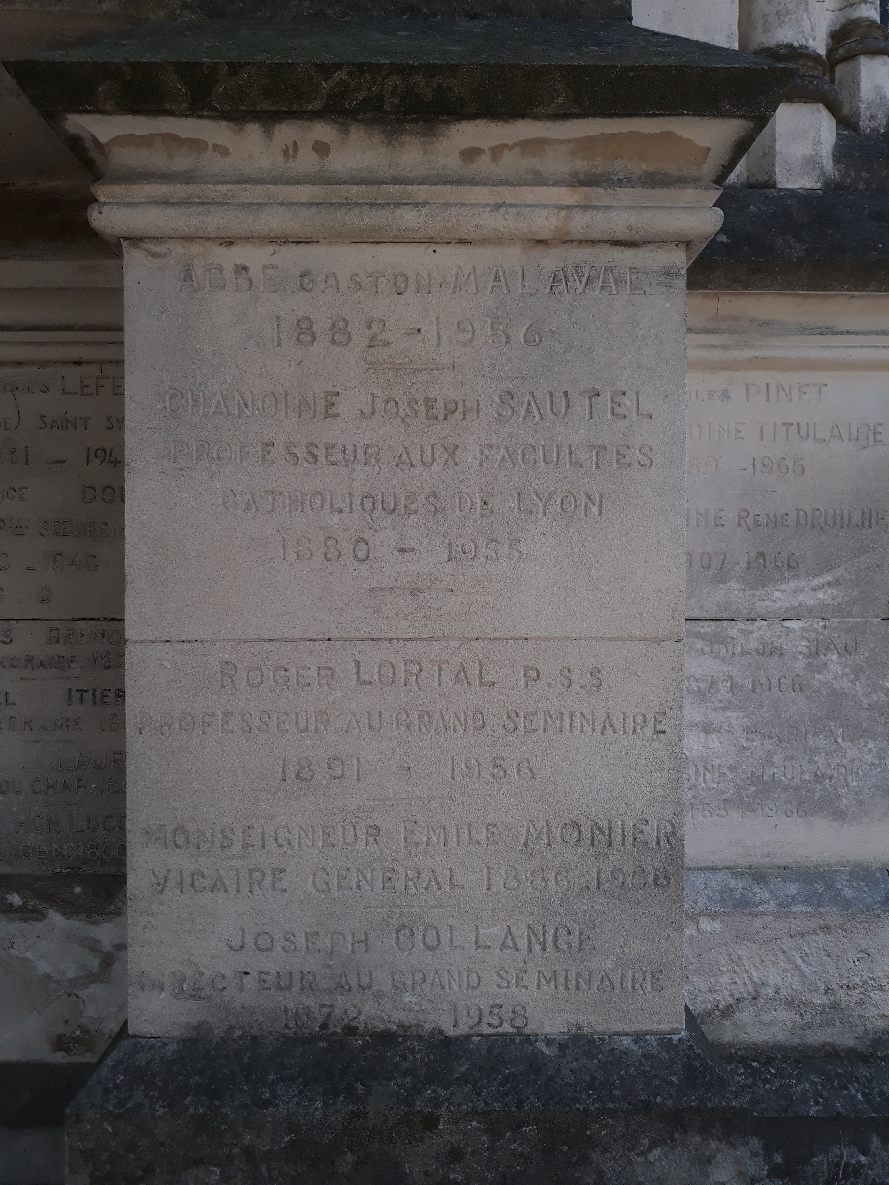 Grabinschrift des französischen Priesters und Archäologen Joseph Sautel im Priestergrab auf dem Cimetière Seint-Véran in Avignon.